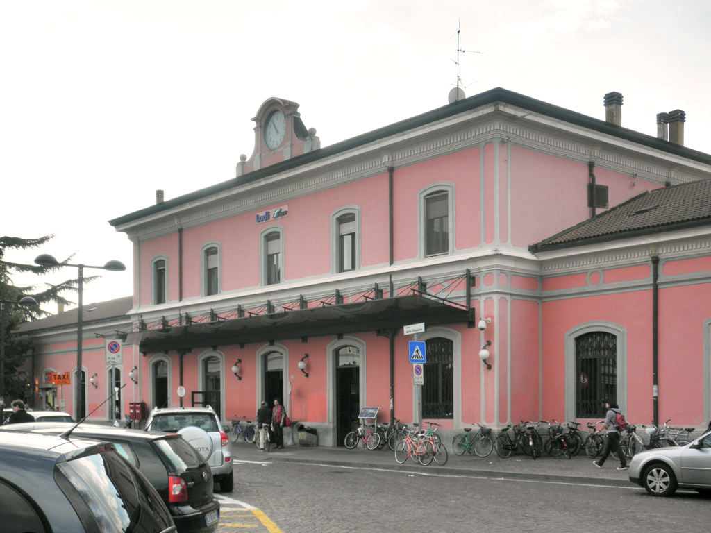 Stazione ferroviaria di Lodi